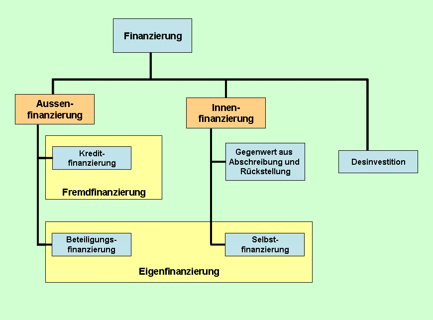 (c) Othmar Lippuner, Switzerland; Gliederung der hauptsächlichen Finanzierungsformen (BWL, Finanzmanagement)